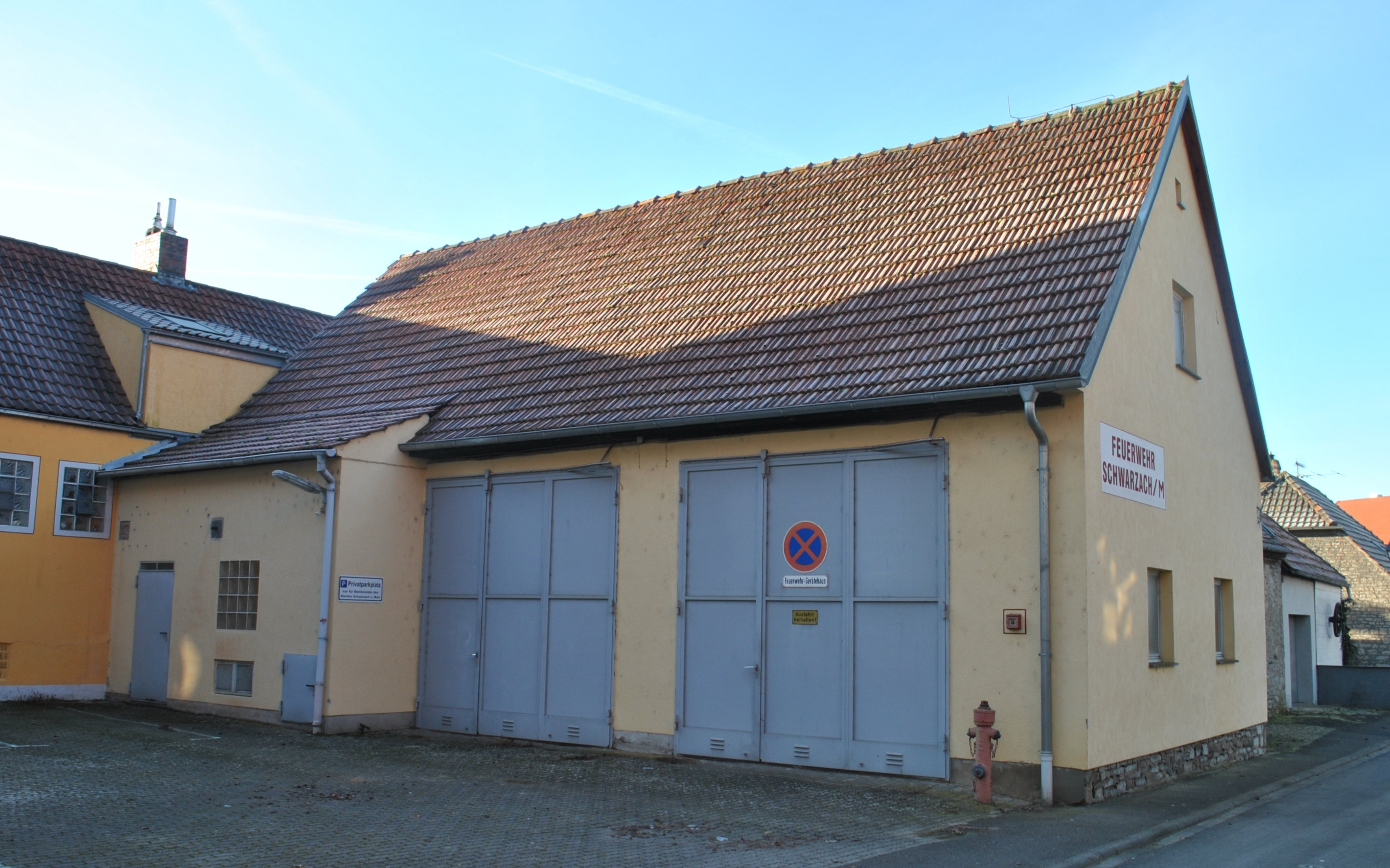 Feuerwehrhaus Stadtschwarzach, Schmiedsgasse, Bezeichnung: "Feuerwehrhaus Schwarzach/Main"